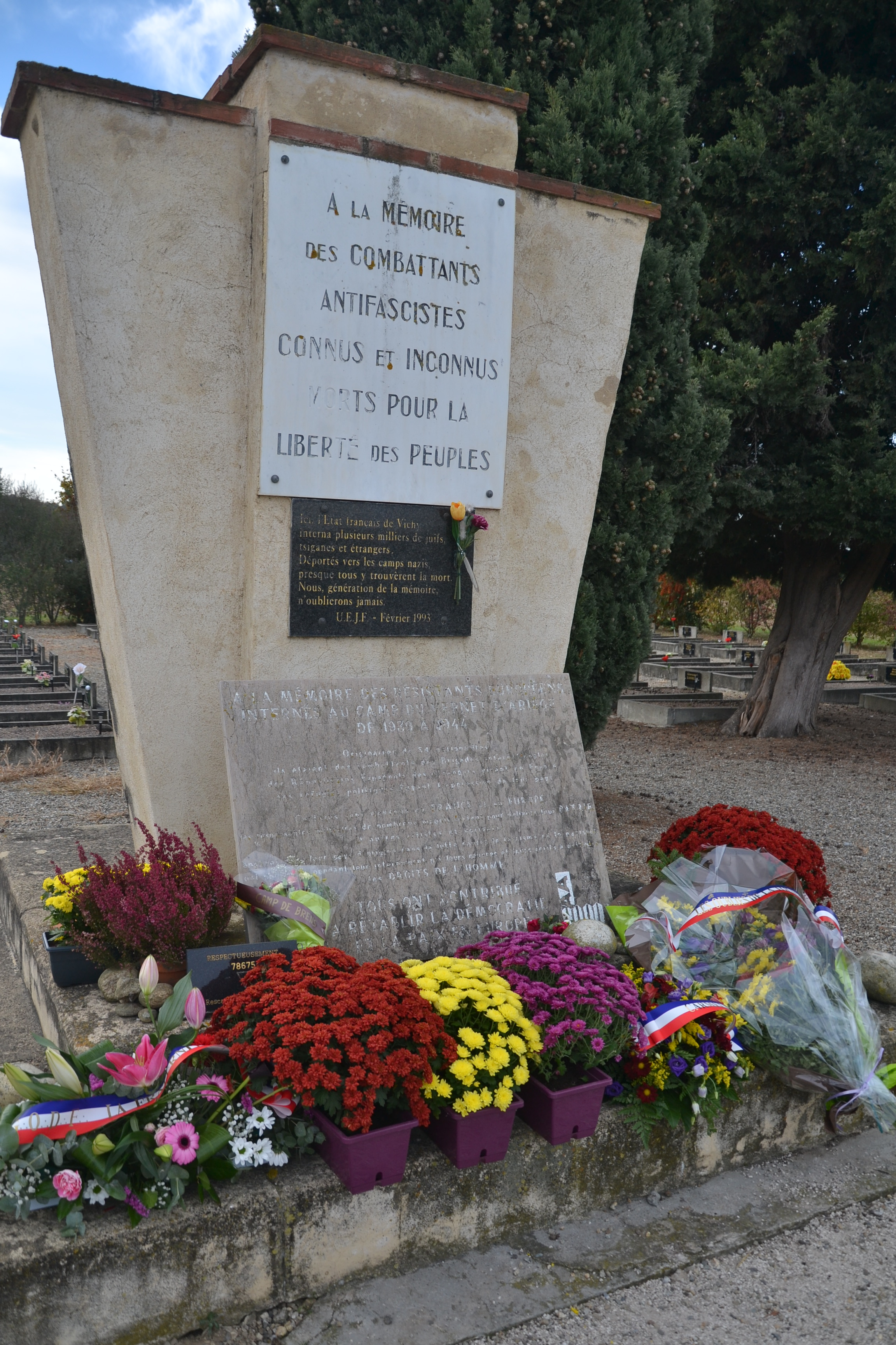 Mémorial et cimetière du Vernet-d'Ariège (France).